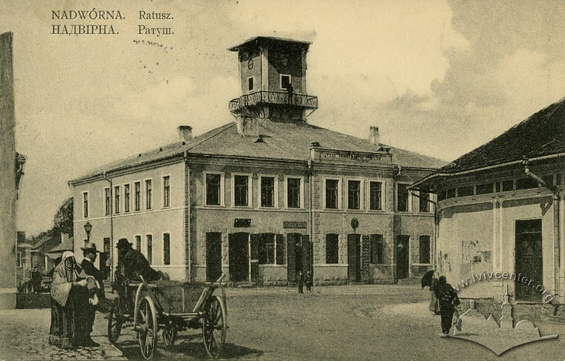 Надвірна, ратуша. 1914 рік